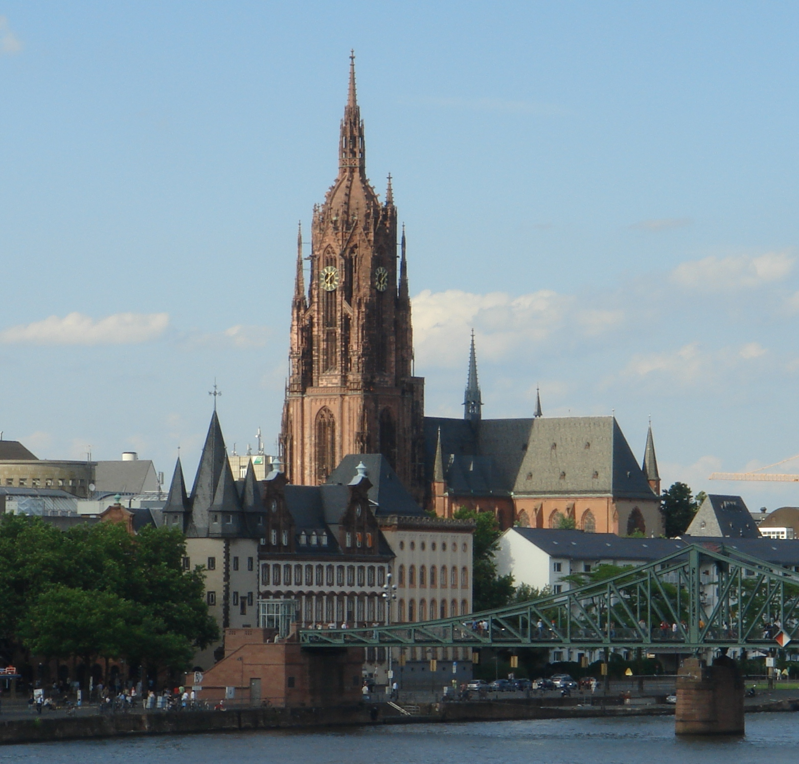 Frankfurter Dom, Westturm, im Vordergrund Eiserner Steg und Saalhof